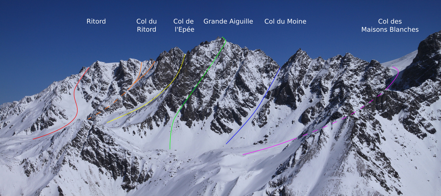 Cresta montuosa che sovrasta Bourg-Saint-Pierre nel massiccio del Grand Combin nel Canton Vallese